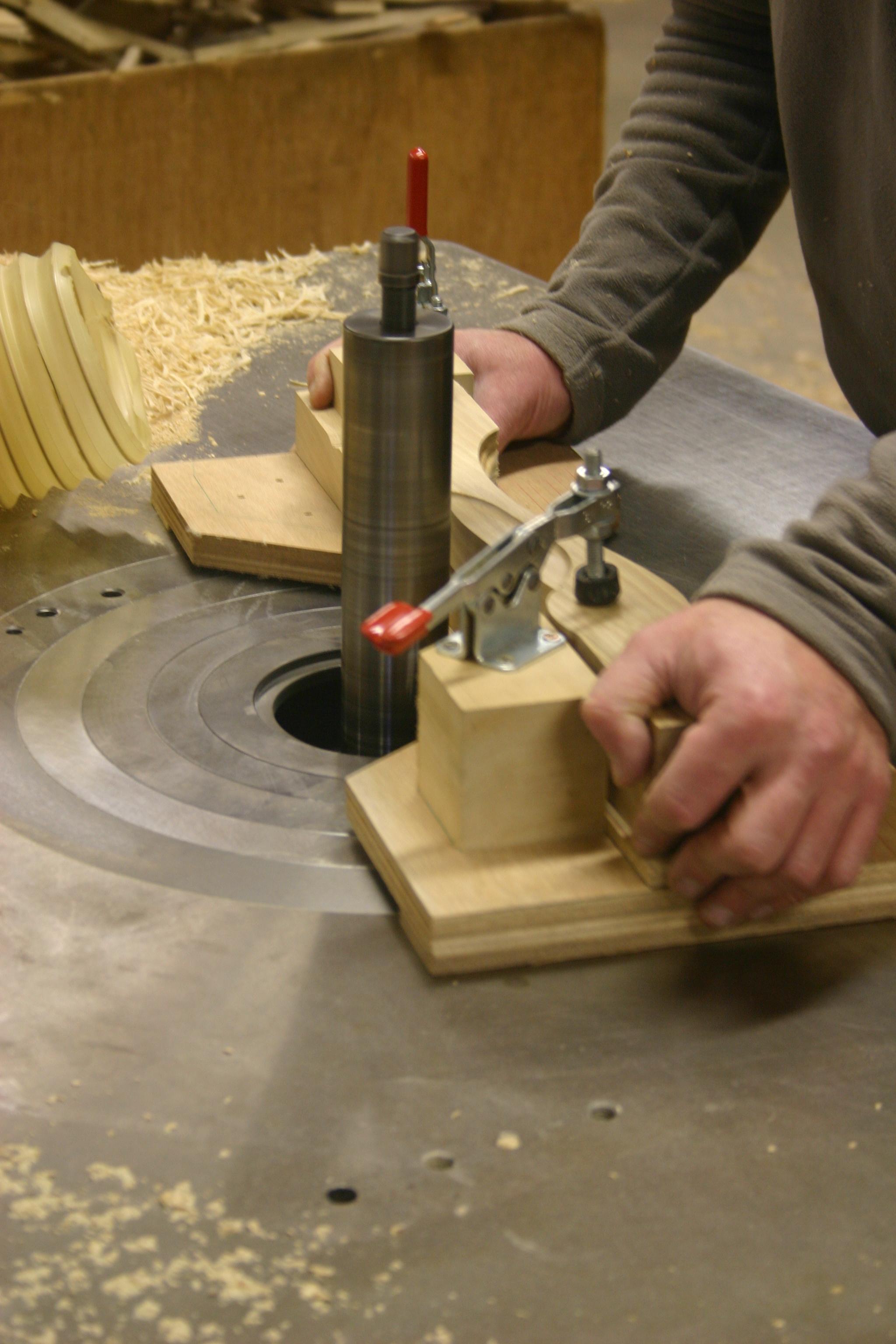 Toupillage au gabarit d'une pièce de bois "haut de dossier"